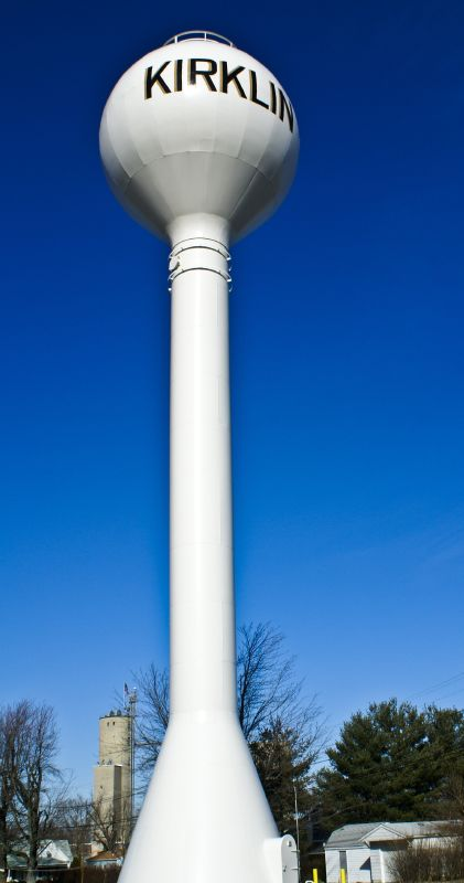 Kirklin, Indiana water tower.